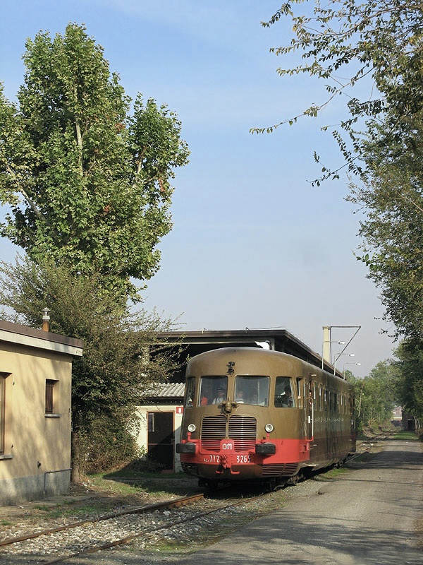 Automotrice termica ALn 772.3265 delle Ferrovie dello Stato, restaurata per treni speciali, in mostra al deposito locomotive di Milano Smistamento.